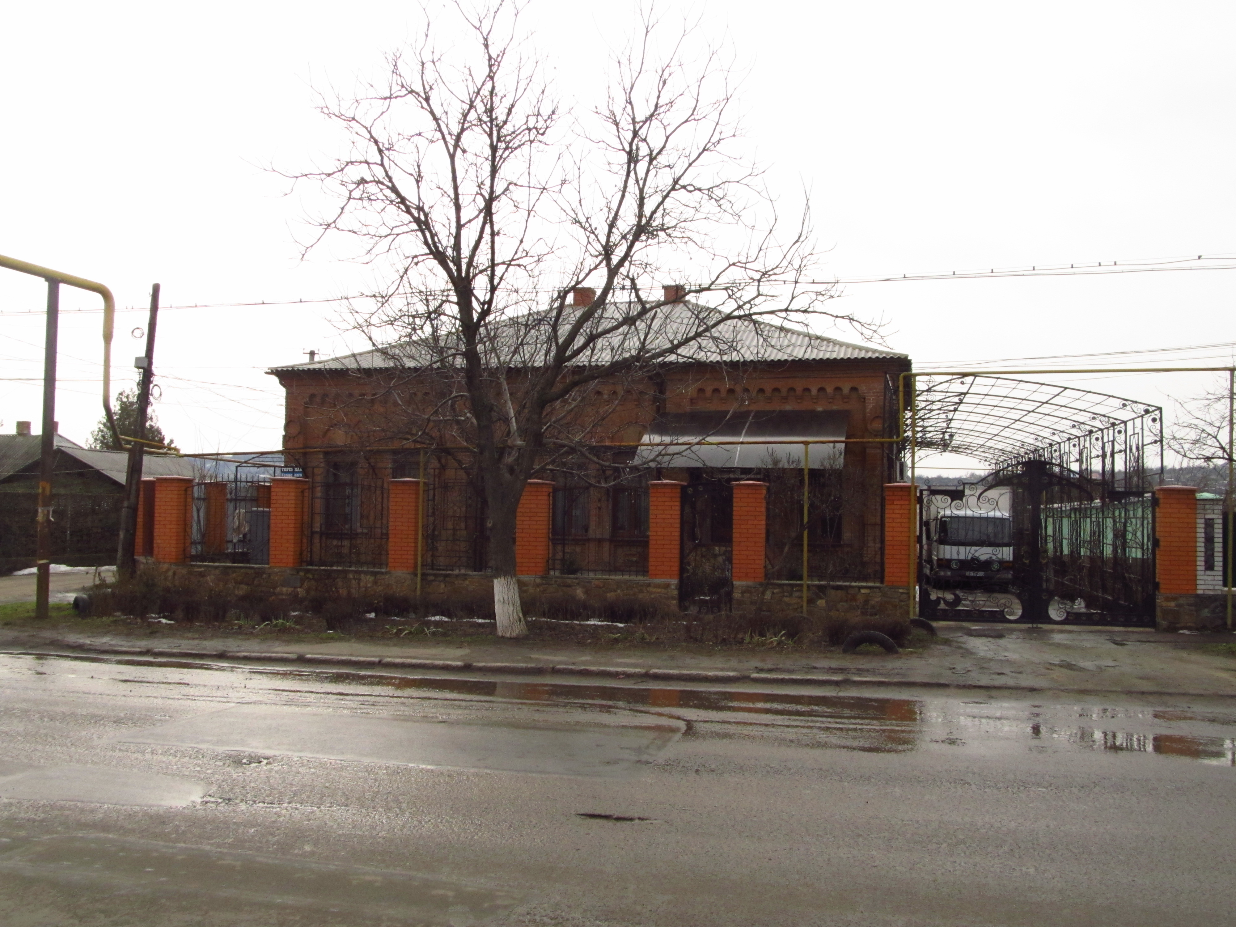 Житловий будинок Е. Багрицького, Балта, вул. Котовського, 111